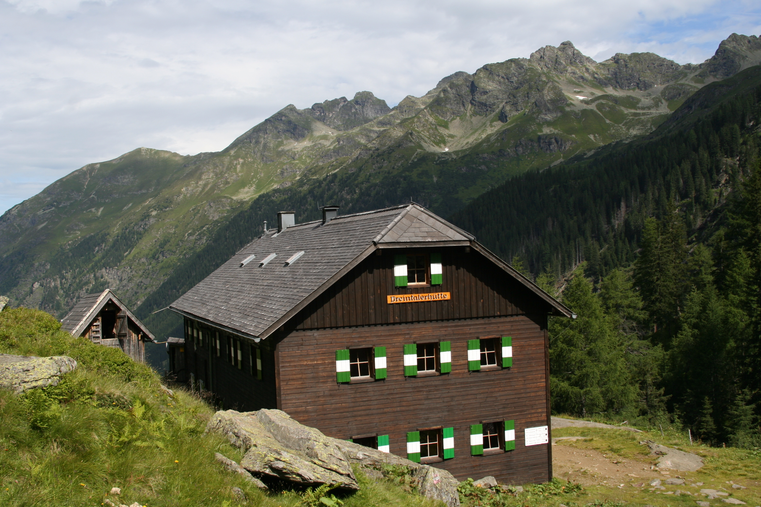 the Preintalerhütte in the Schladminger Tauern in Austria